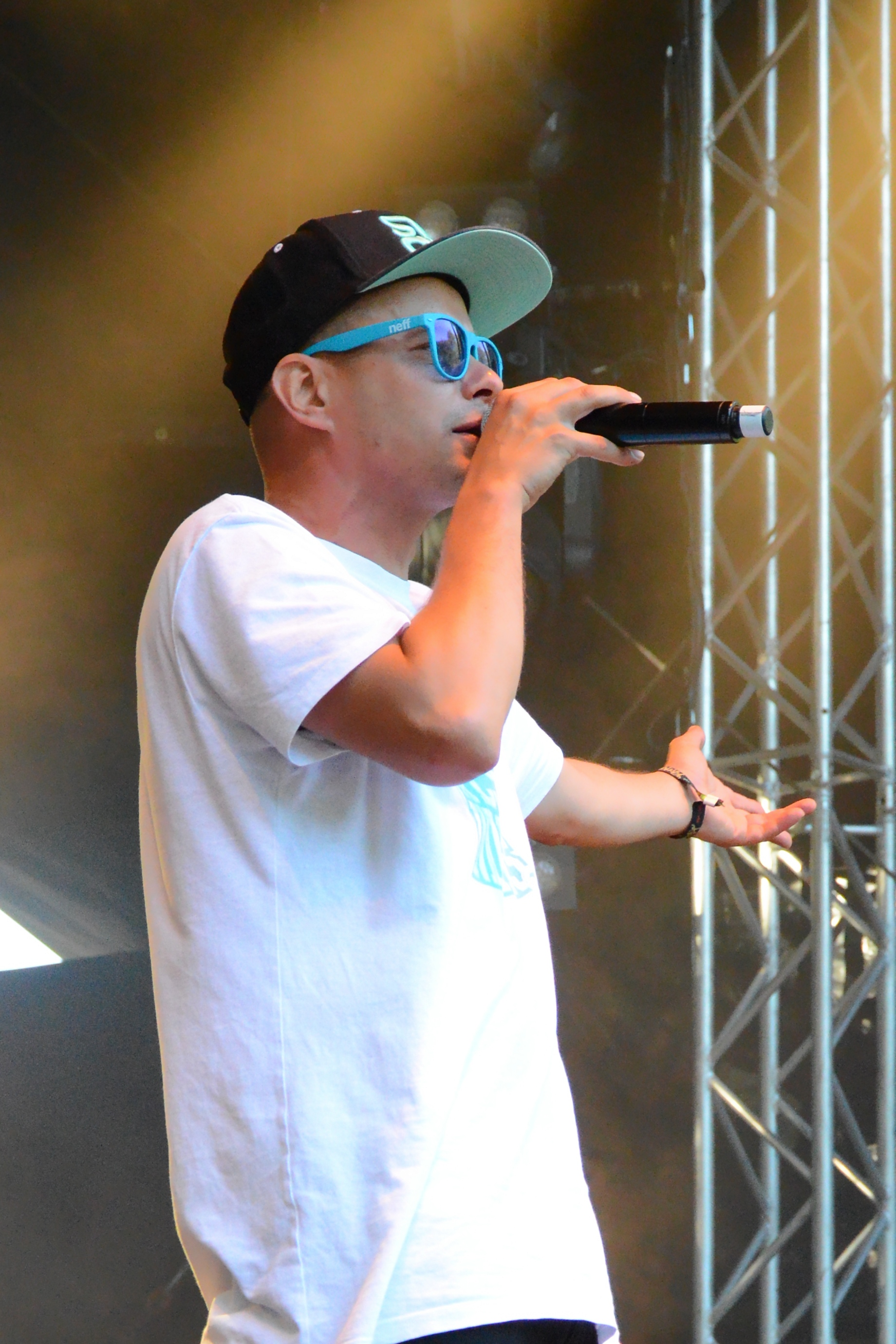 Ronny Trettmann beim Ruhr Reggae Summer 2013